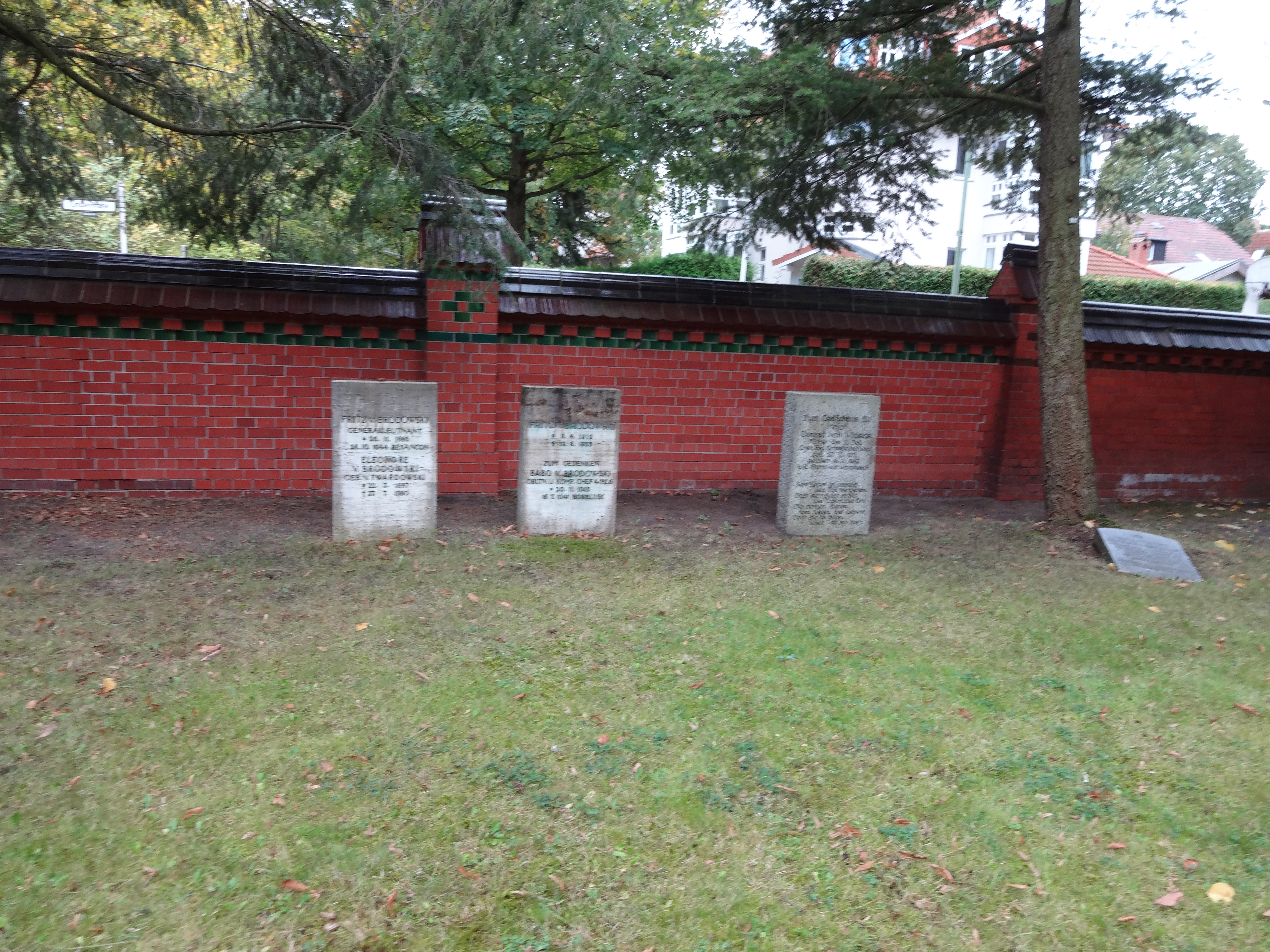 Grab von Fritz von Brodowski auf dem Friedhof Wannsee, Lindenstraße